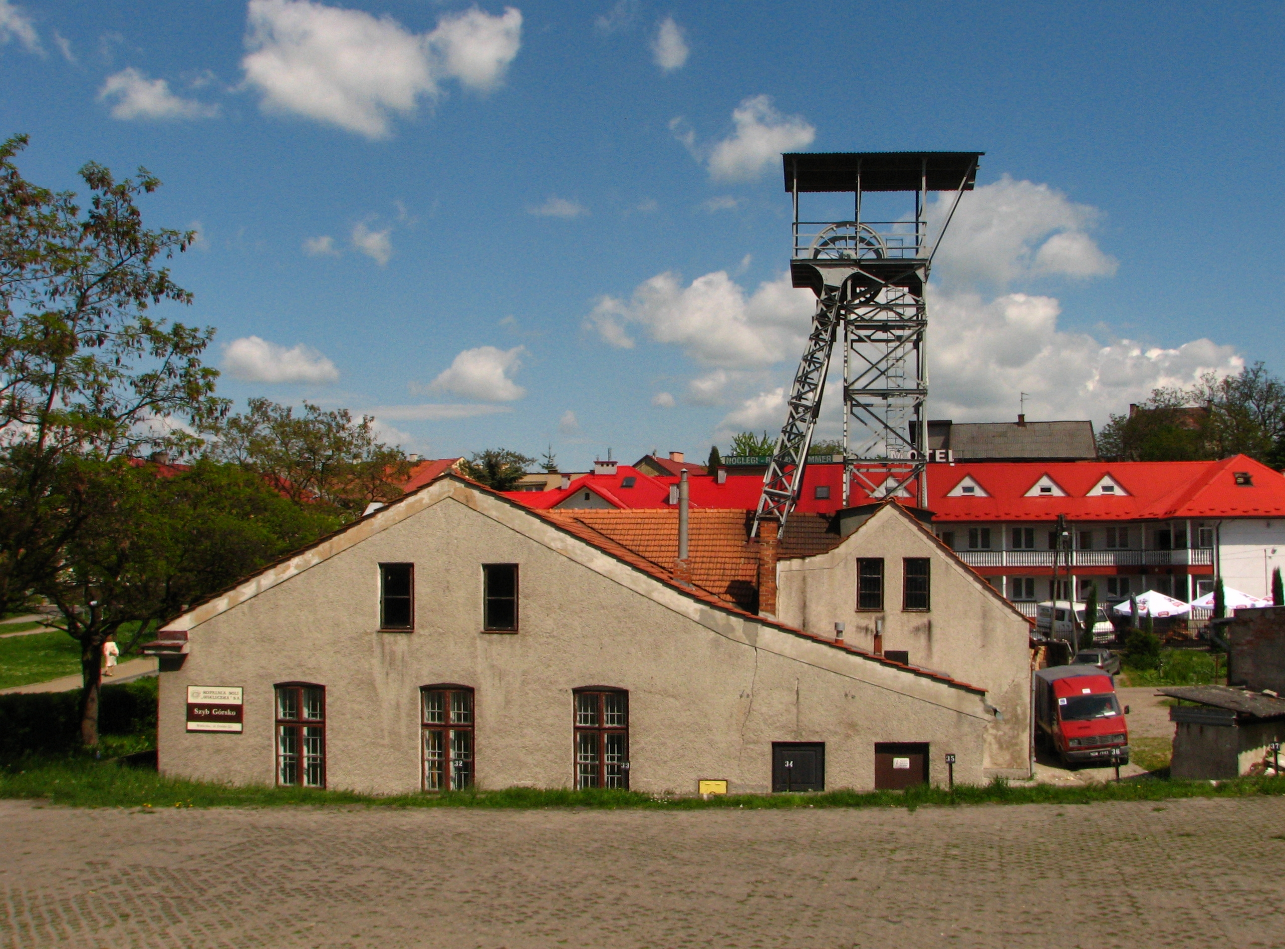 Nadszybie szybu Górsko kopalni soli Wieliczka w Wieliczce.